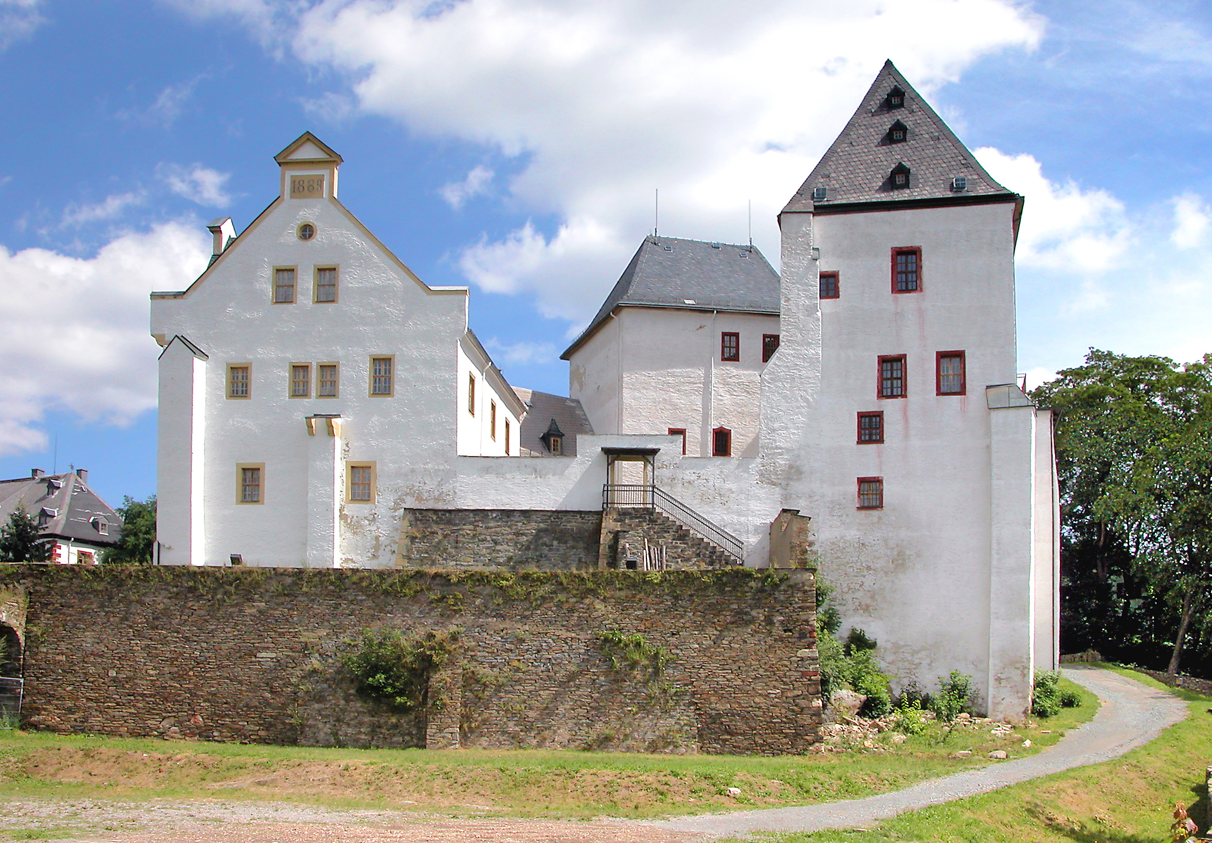 03.08.2006 09429 Wolkenstein: Burg (GMP: 50.654896,13.064900) aus dem 12. Jh., ab 1505 zum Schloß ausgebaut, mehrfach umgebaut. In der DDR zu Wohnzwecken genutzt. Jetzt Museum. Sicht von der Vorburg aus SW. [DSCN10852.TIF]20060803160DR.JPG/Blobelt